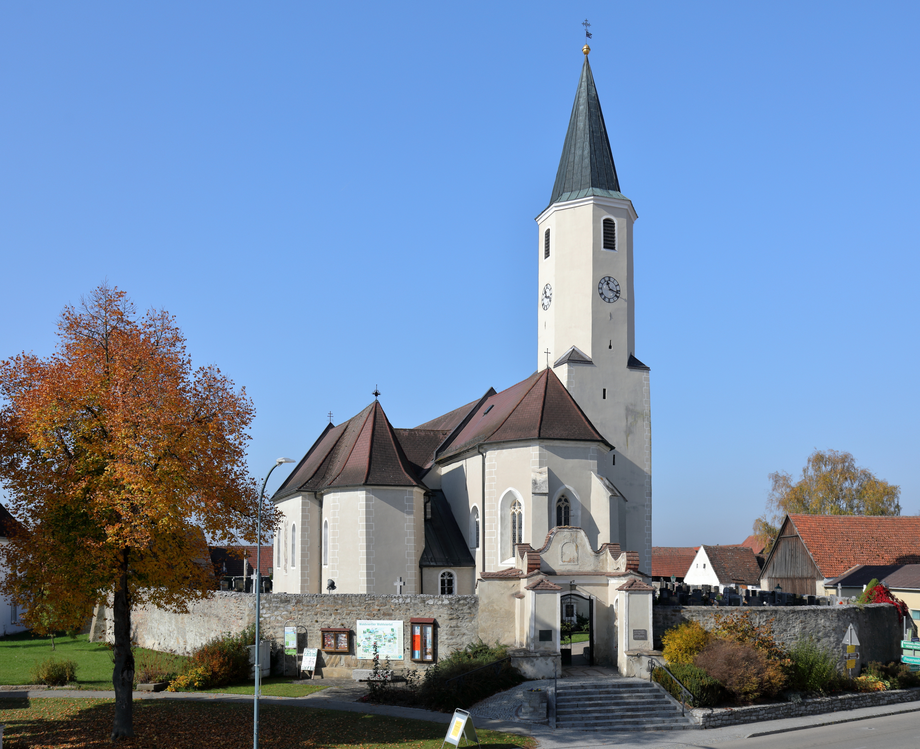 Ostansicht der röm.-kath. Pfarrkirche Mariä Himmelfahrt in der niederösterreichischen Marktgemeinde Langau bei Geras. Die von einem Friedhof mit mächtiger Umfassungsmauer umgebene Kirche hat ein Langhaus mit mittelalterlicher Bausubstanz, das 1628 sowie nach einem Brand 1709 umgebaut wurde. Der Turm im nördl. Chorwinkel und der Chor sind spätgotisch. Südseitig ist eine gotische Kapelle angebaut, die barockisiert wurde. Das Hauptportal stammt aus der 2. Hälfte des 18. Jahrhundert.